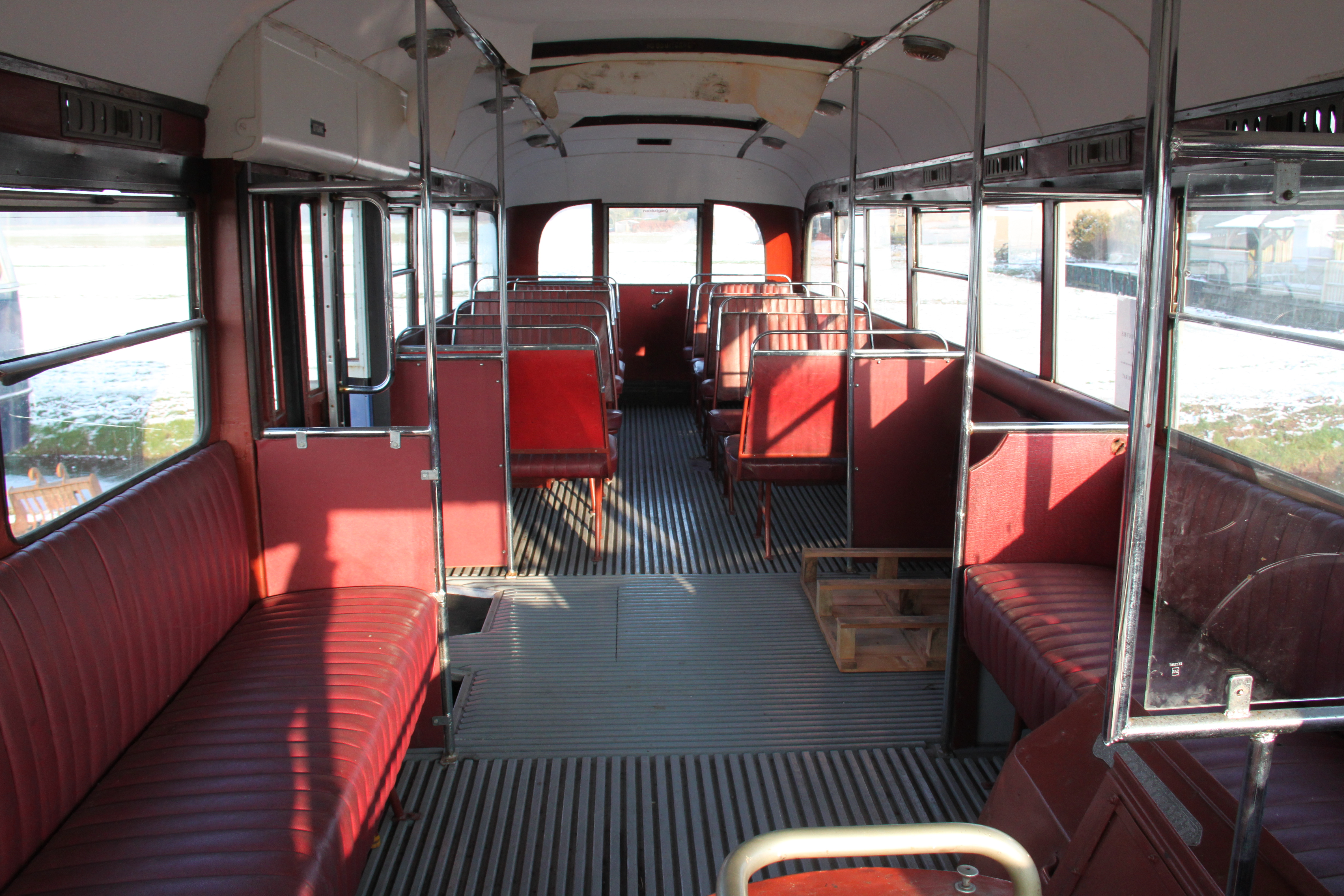 De GVB 157 uit 1941 bij het Nationaal Openbaar Vervoer museum in Ouwsterhaule. Inmiddels is de bus overgenomen door de Stichting Veteraan Autobussen.